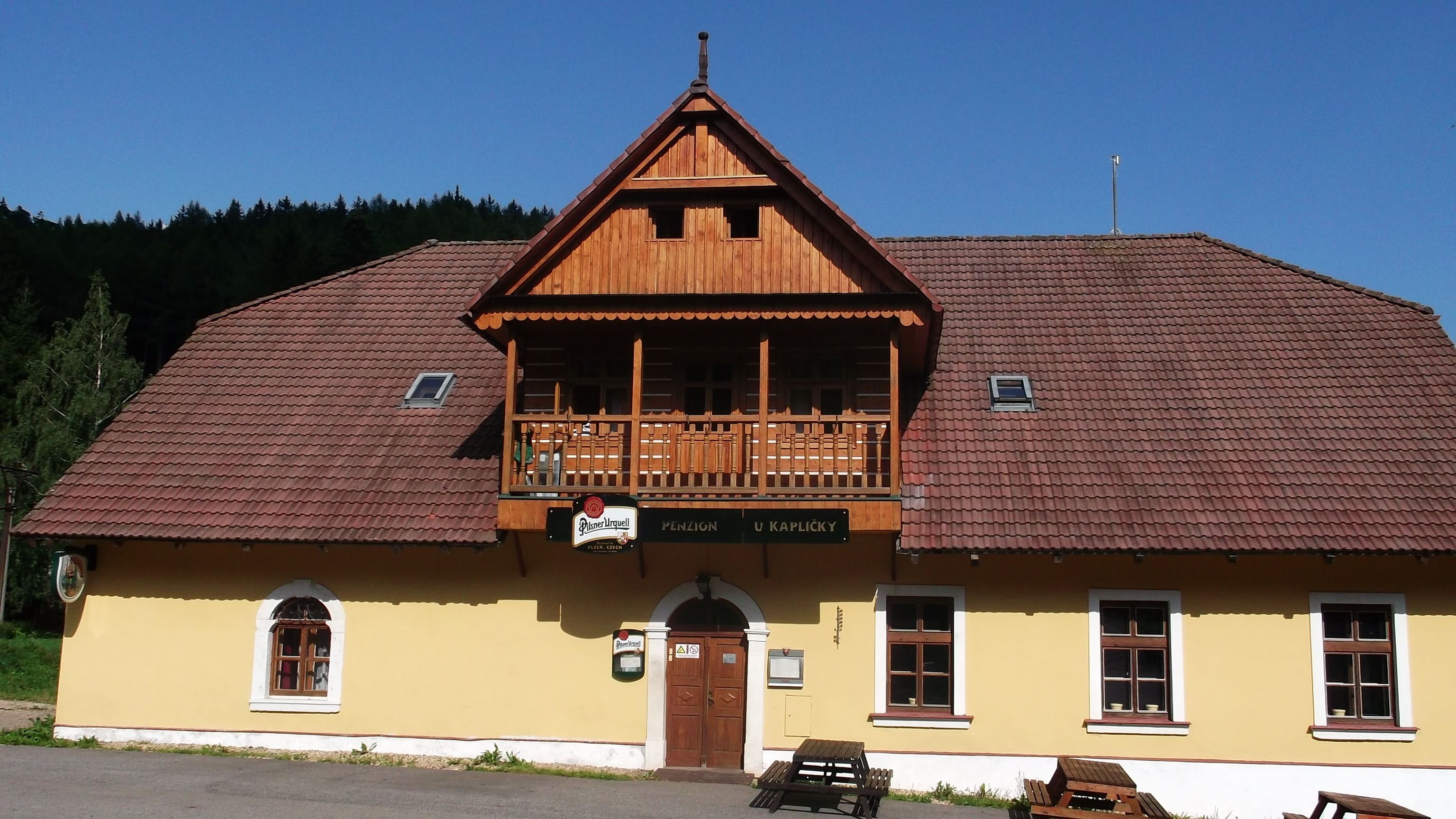 Zaclerz, Drewniana Dolina